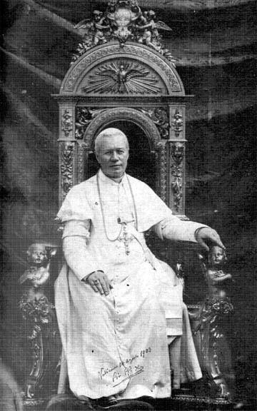 Papa Pio X, 1903, Archivio personale